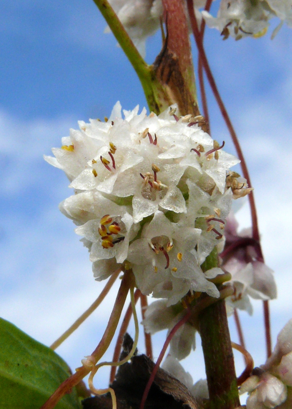 Cuscuta epithymum, Schwäbisch-Fränkische Waldberge, Deutschland